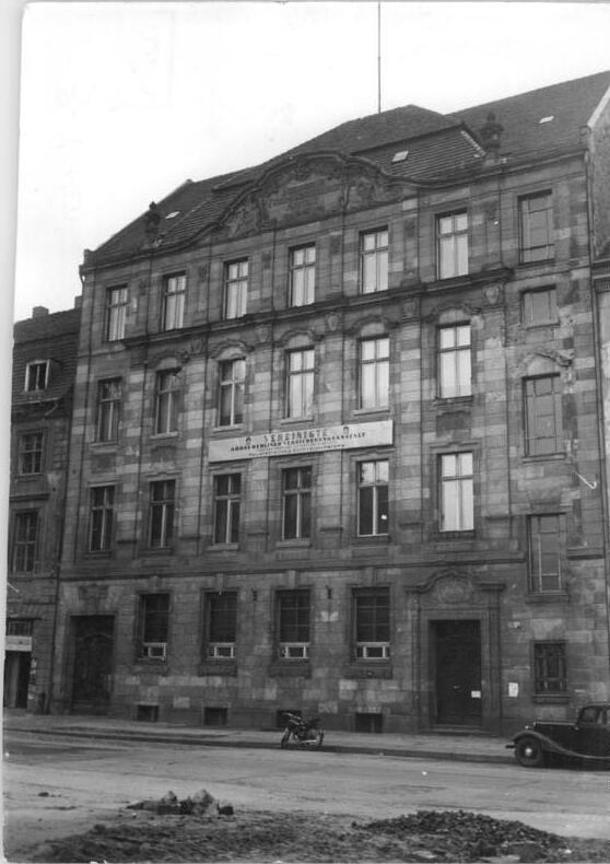 This description has been identified as biased or incorrect: it is the wrong name of the houseZentralbild-Gielow, 18.1.1952, Alte Berliner Häuser. UBz:Lessing-Nicolai-Haus, Brüderstr.13 Information added by Wikimedia users.Das Foto zeigt nicht das Lessing-Nicolai-Haus (Hausnummer 13) sondern das nebenstehende für die Berlinische Feuerversicherung von den Architekten Reimer und Körte gebaute Gebäude mit den Hausnummern 11/12.